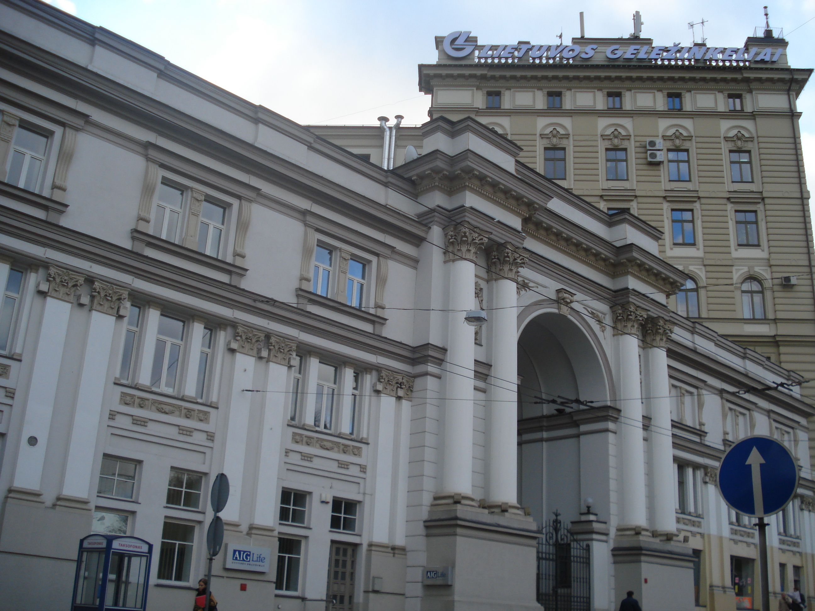 Управление Полесских железных дорог на Погулянке Polesės geležinkelio direkcijos rūmai Vilniuje (AB „Lietuvos geležinkeliai“ administracinis pastatas; J. Basanavičiaus g. 14 / Mindaugo g. 12 Headquarter of Lithuanian Railways Company in Vilnius. Build 1913. Architect Tadeusz Maria Rostworowski